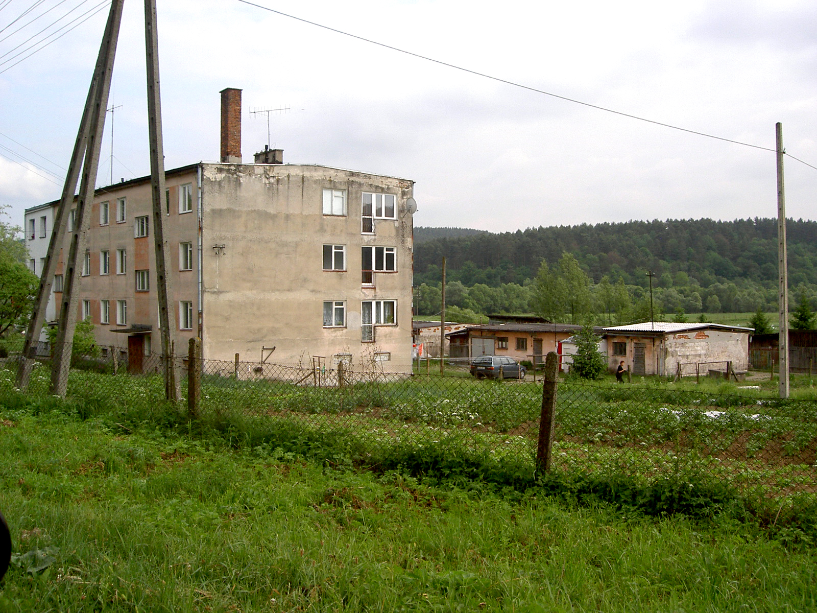 Rybotycze, PGR • Rybotycze, Poland - PGR